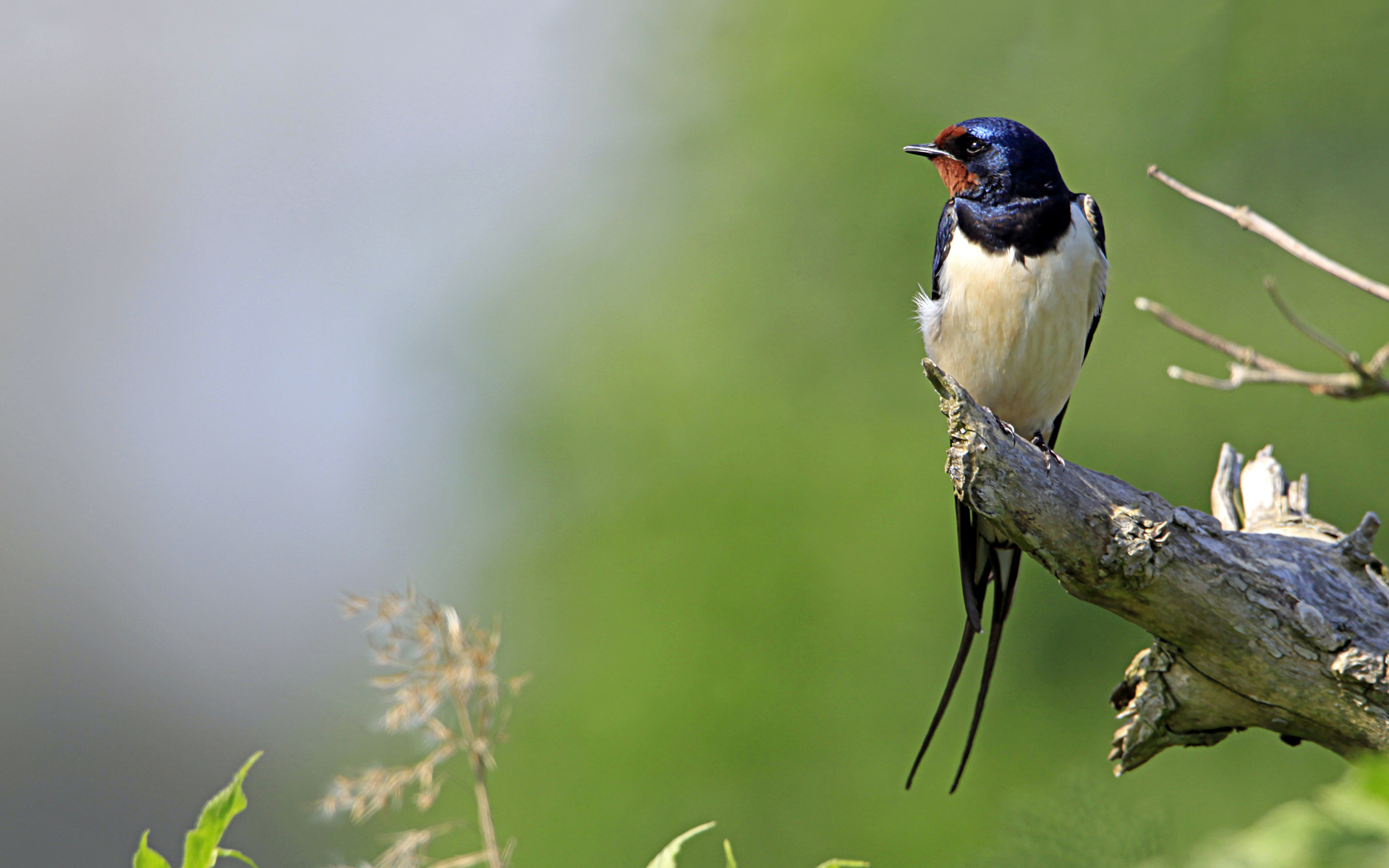 Rauchschwalbe (Hirundo rustica) im NSG Fischteiche in der Lewitz in Mecklenburg-Vorpommern